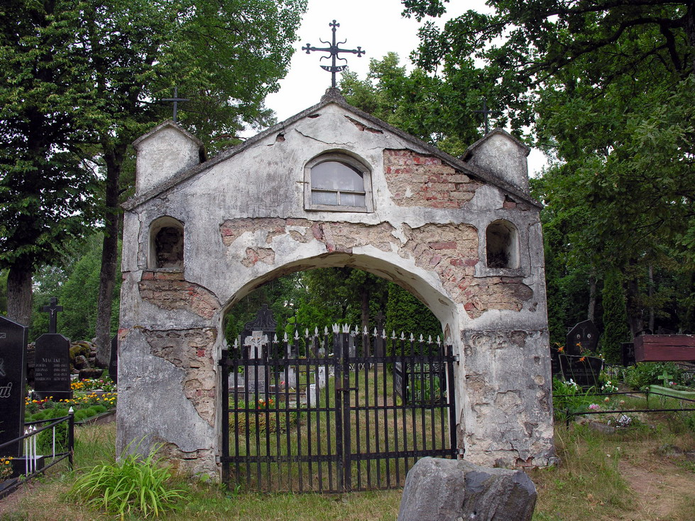 Dauginių kapinaičių vartai, Mažeikių raj., Viekšnių seniūnija. Foto: Algirdas, 2006 m. liepos 18 d., Lietuva